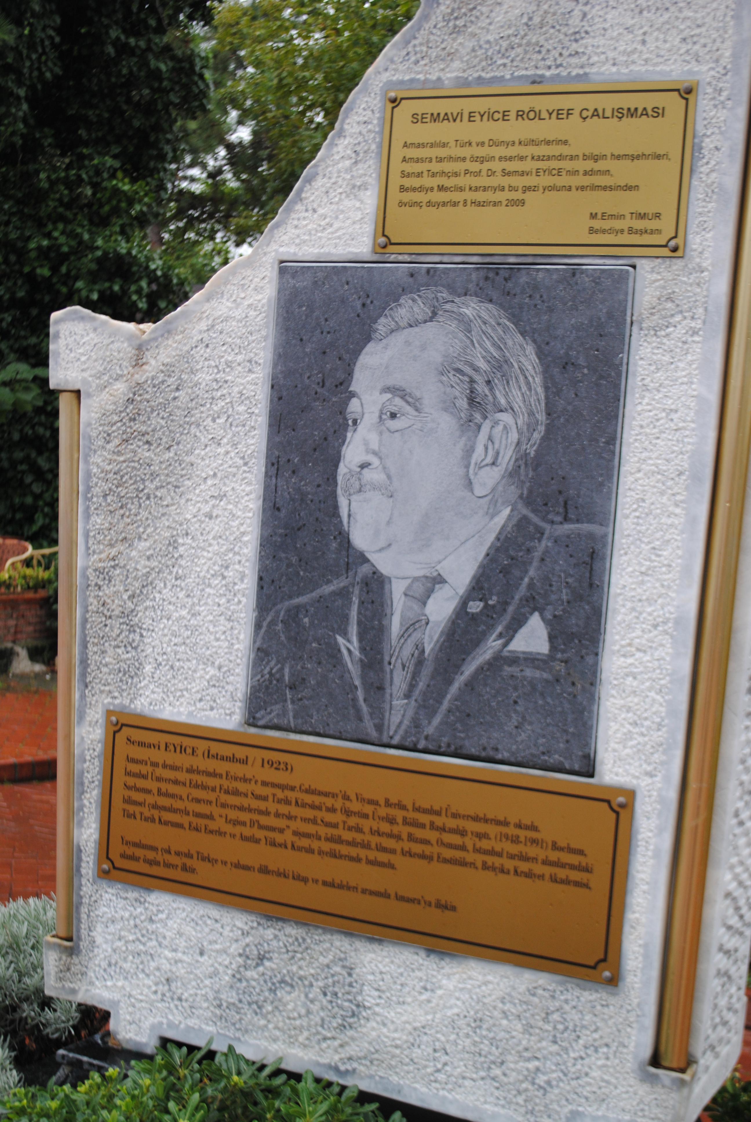 Amasra'dan çeşitli görüntüler